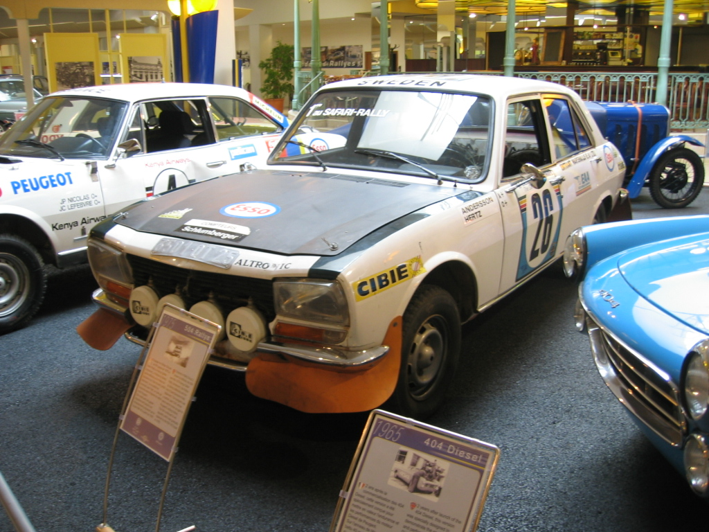 Peugeot 504 rallyes africains - Musée Peugeot Sochaux